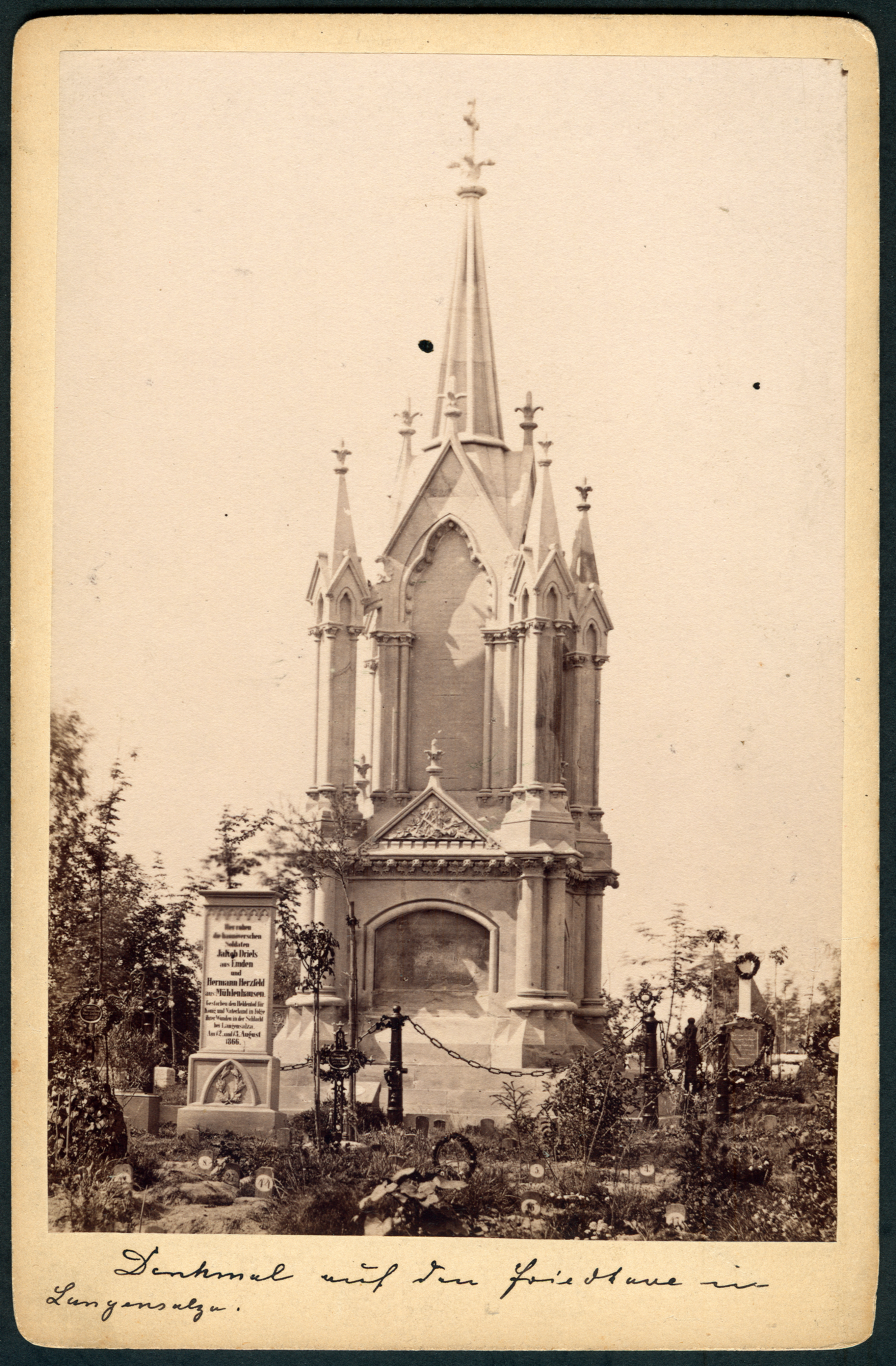 Das Langensalza-Denkmal auf dem alten Friedhof in Bad Langensalza, aufgenommen von dem Fotografen Christian Bregazzi. Der Fotoabzug auf einem Kartonträger im Kabinettformat zeigt das am 27. Juni 1868 enthüllte Denkmal für die durch die Schlacht bei Langensalza gefallenen Soldaten des Königreichs Hannover. Rings um das Mal sind weitere, teils frische und vielfach nur mit einer Nummer versehenen Grabstellen zu sehen, Offensichtlich wurde die Ansicht kurz nach einer Gedenkveranstaltung aufgenommen, denn an mehreren teils eisernen Grabkreuzen sind frisch gebundene Kränze zu erkennen. Unter den Grabmälern ragt eines im Vordergrund links heraus. Es trägt die Inschrift „Hier ruhen die hannoverschen Soldaten Jakob Driels aus Emden und Hermann Herzfeld aus Mühlenhausen. Gestorben den Heldentod für König und Vaterland in Folge ihrer Wunden in der Schlacht bei Langensalza. Am 12. und 13. August 1866.“ ...